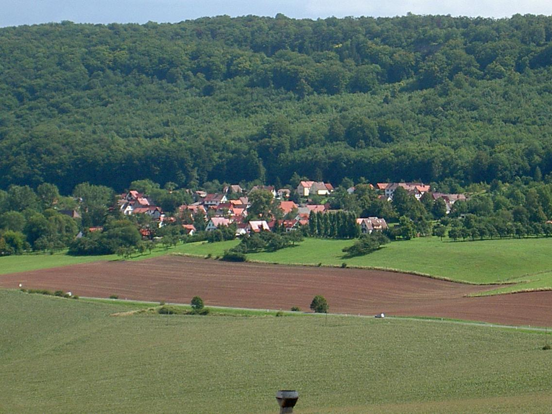 Vollenborn unterhalb der Keulaer Rondels